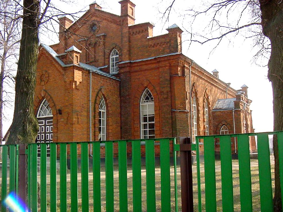 Церква євангелістів християн-баптистів, с. Заздрівка